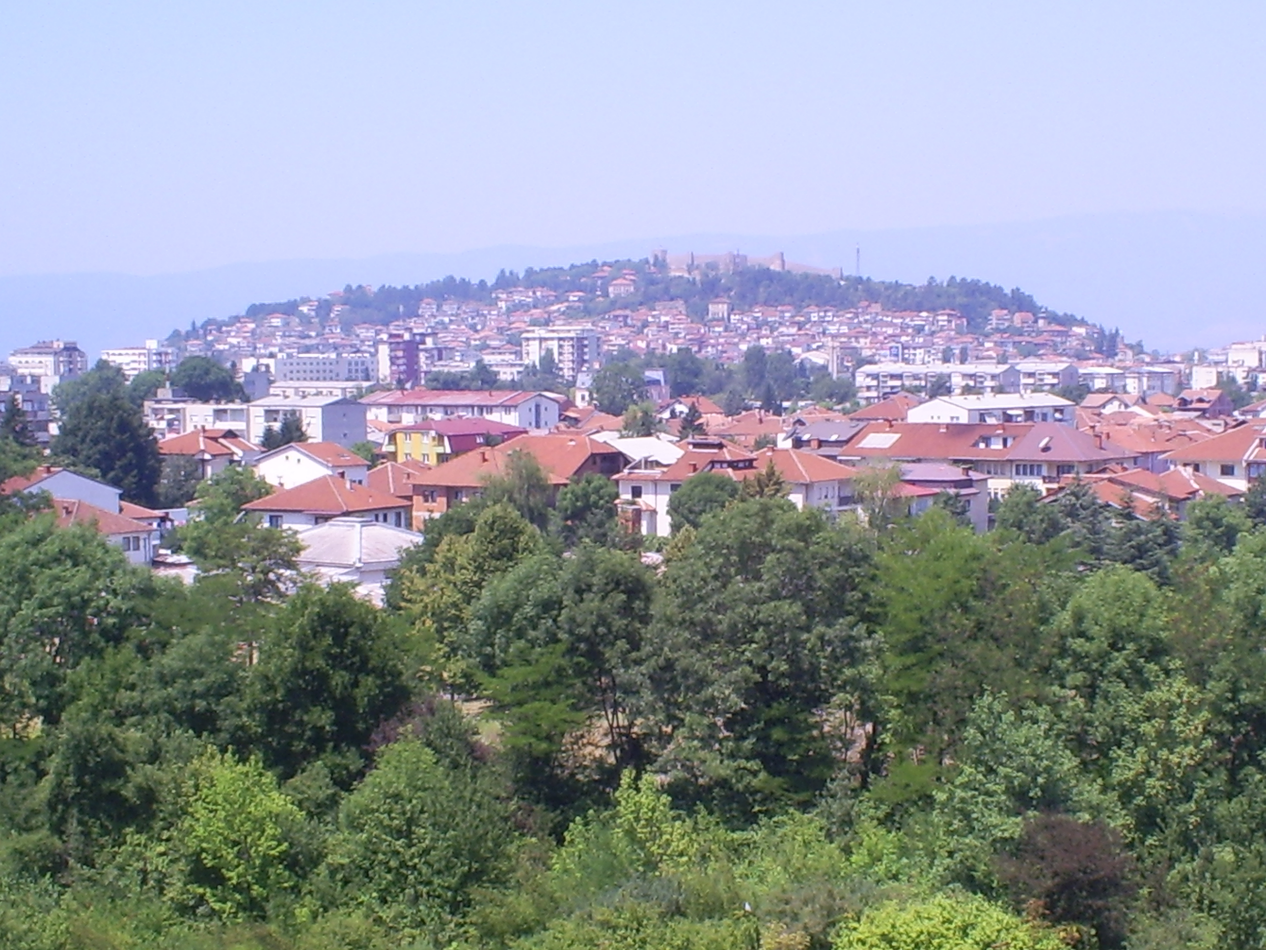 Pogled na Ohridsku tvrdjavu i deo grada. Slikano sa zgrade u naselju Novi Komunalac.